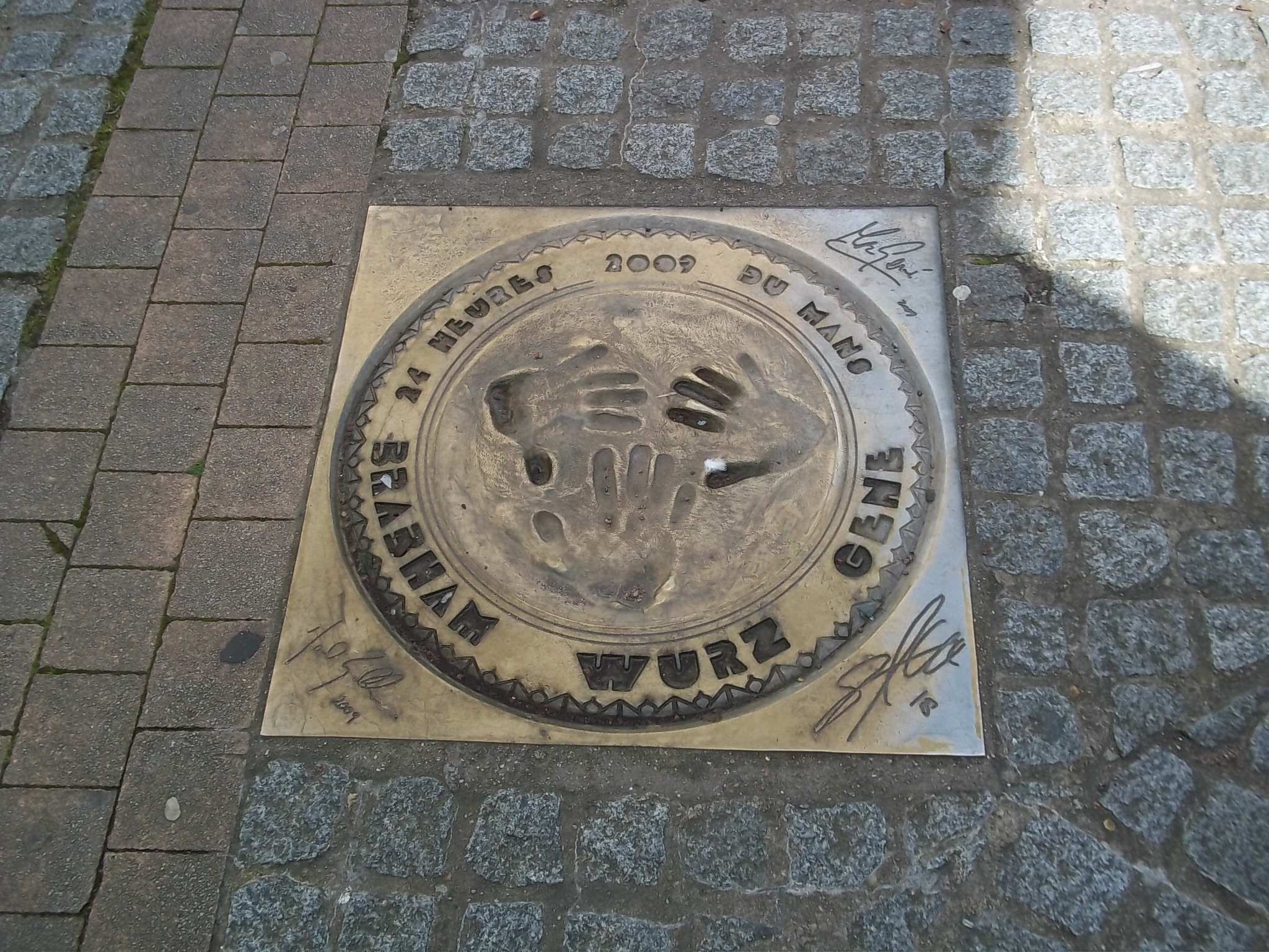 Plaque de bronze des empreintes des vainqueurs des 24 heures 2009